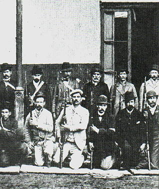 Tropas del Ejército Revolucionario Radical tras su entrenamiento en Temperley, 1893.